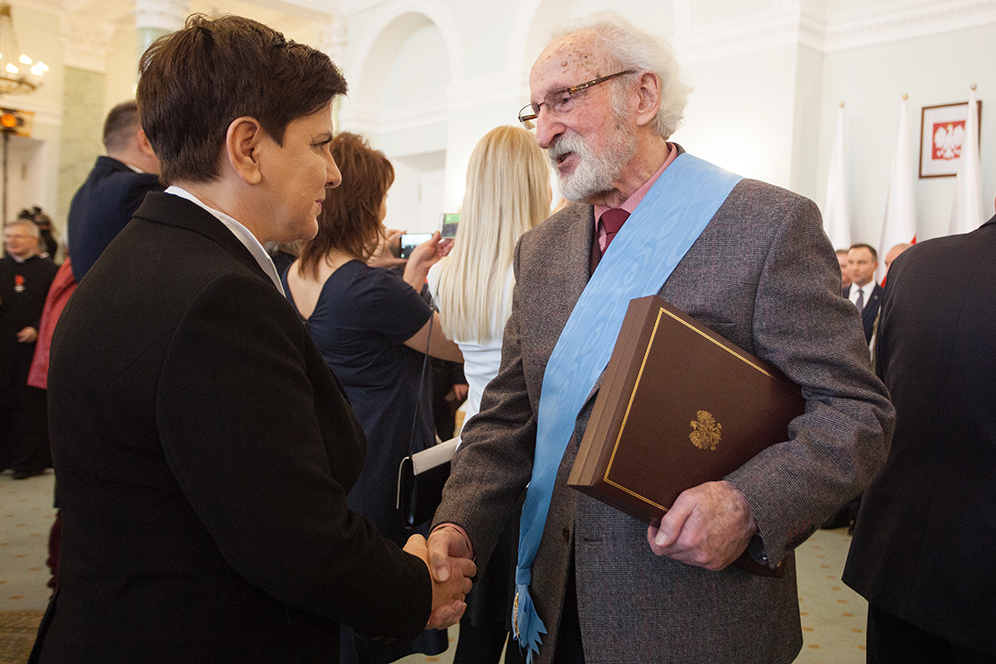 Premier Beata Szydło i aktor Franciszek Pieczka po odznaczeniu artysty przez prezydenta RP Orderem Orła Białego.